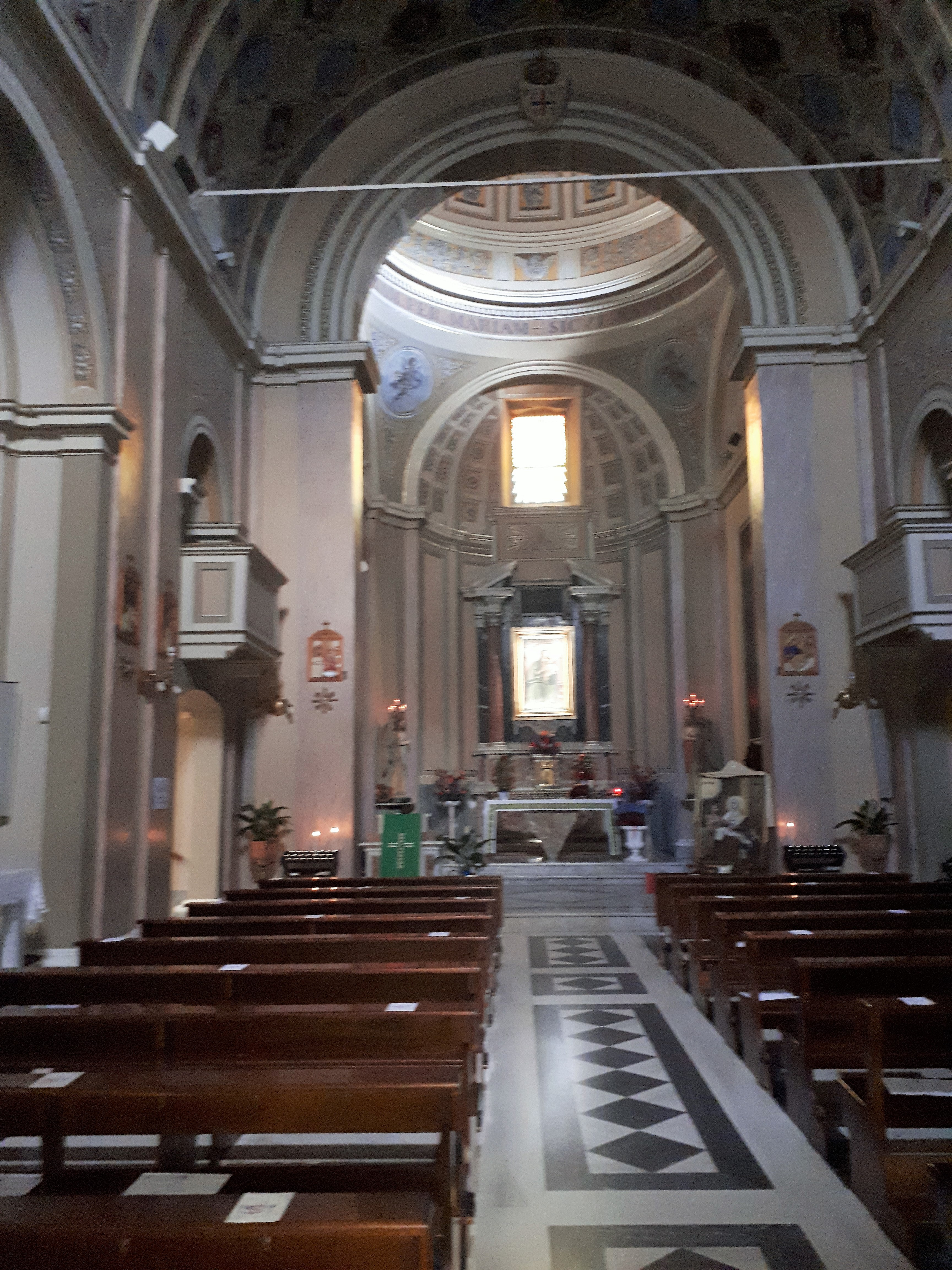 Vista di Cori dal Santuario della Madonna del Soccorso, Cori, Lazio, Italia